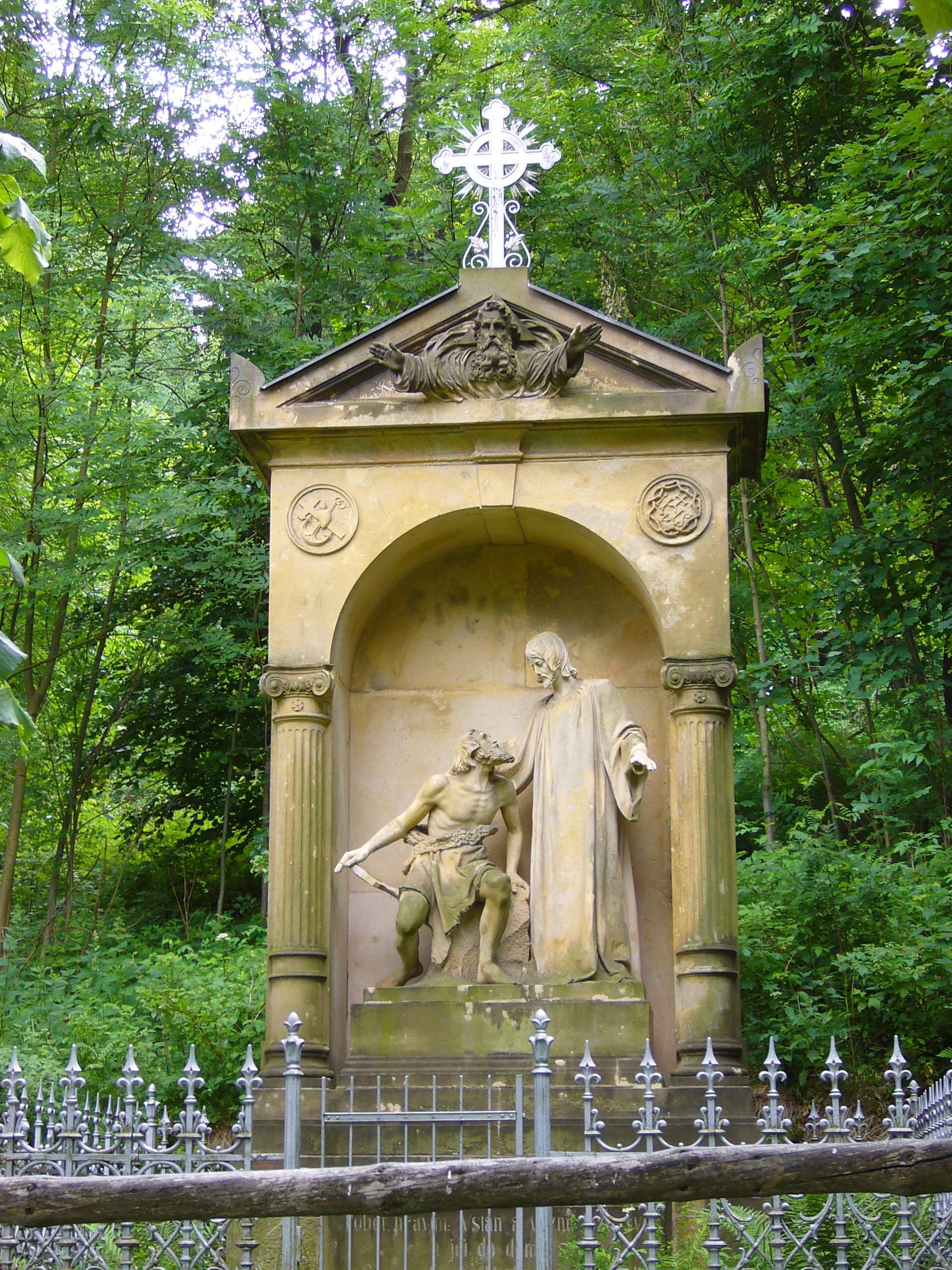 Křížová cesta (Chlum), Tábor, Chlum